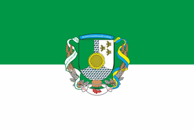 Belokurakinskii rayon fl